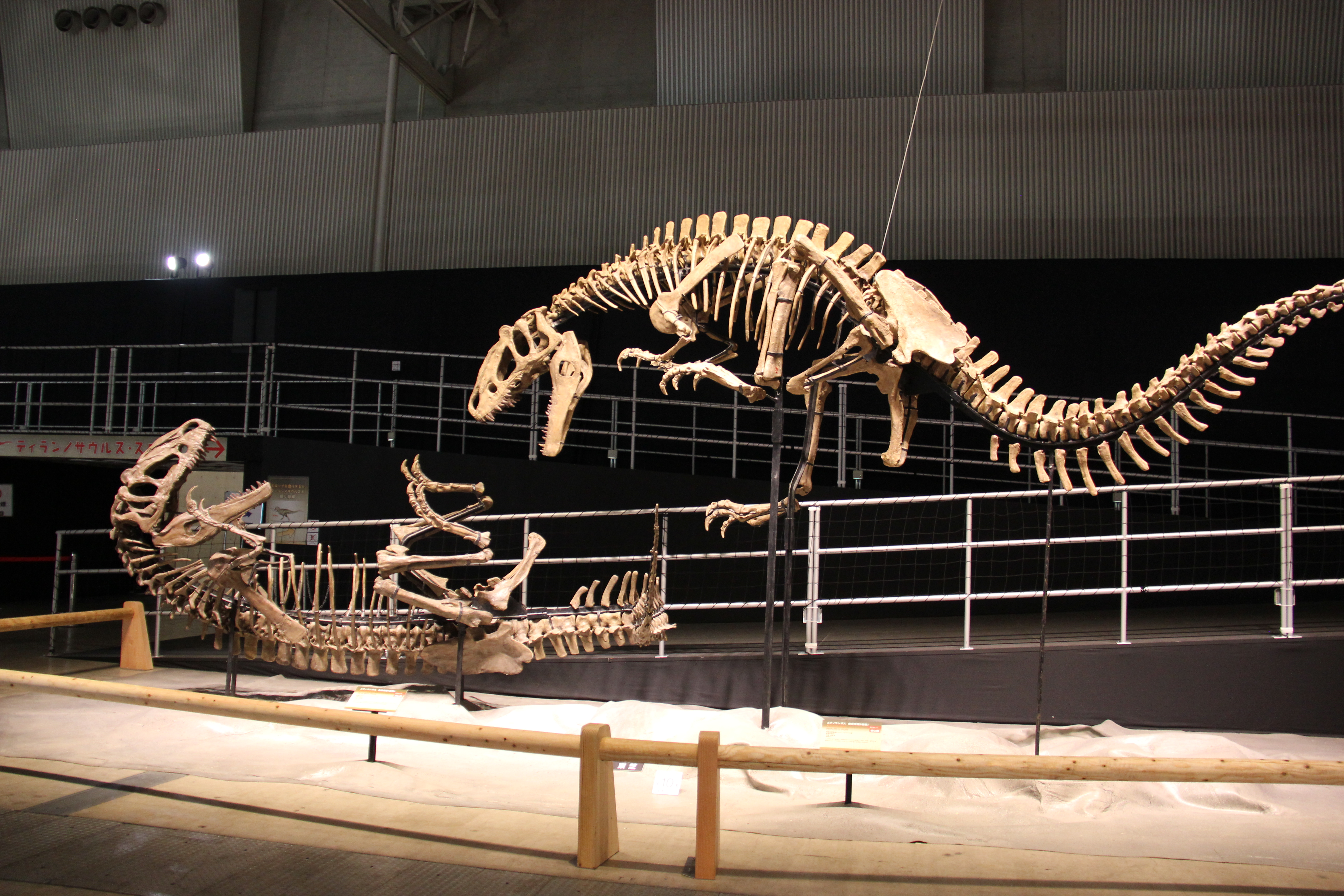 Dino Kingdom 2012